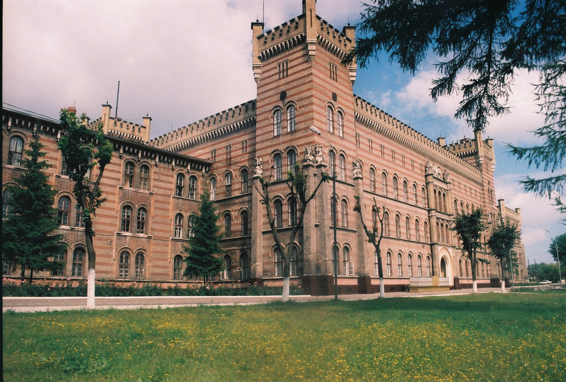 Клепарівська 35, Львівський державний університет безпеки життєдіяльності